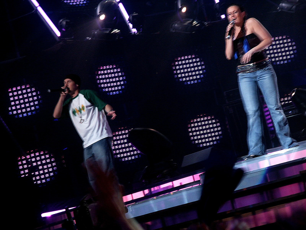 Mezo i Kasia Wilk, Łódź 28 kwietnia 2006.